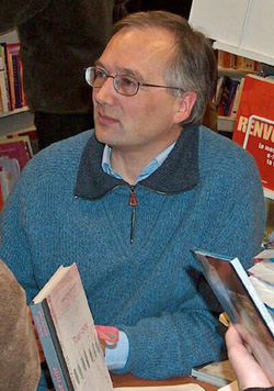 Bernard Friot nantes 2004